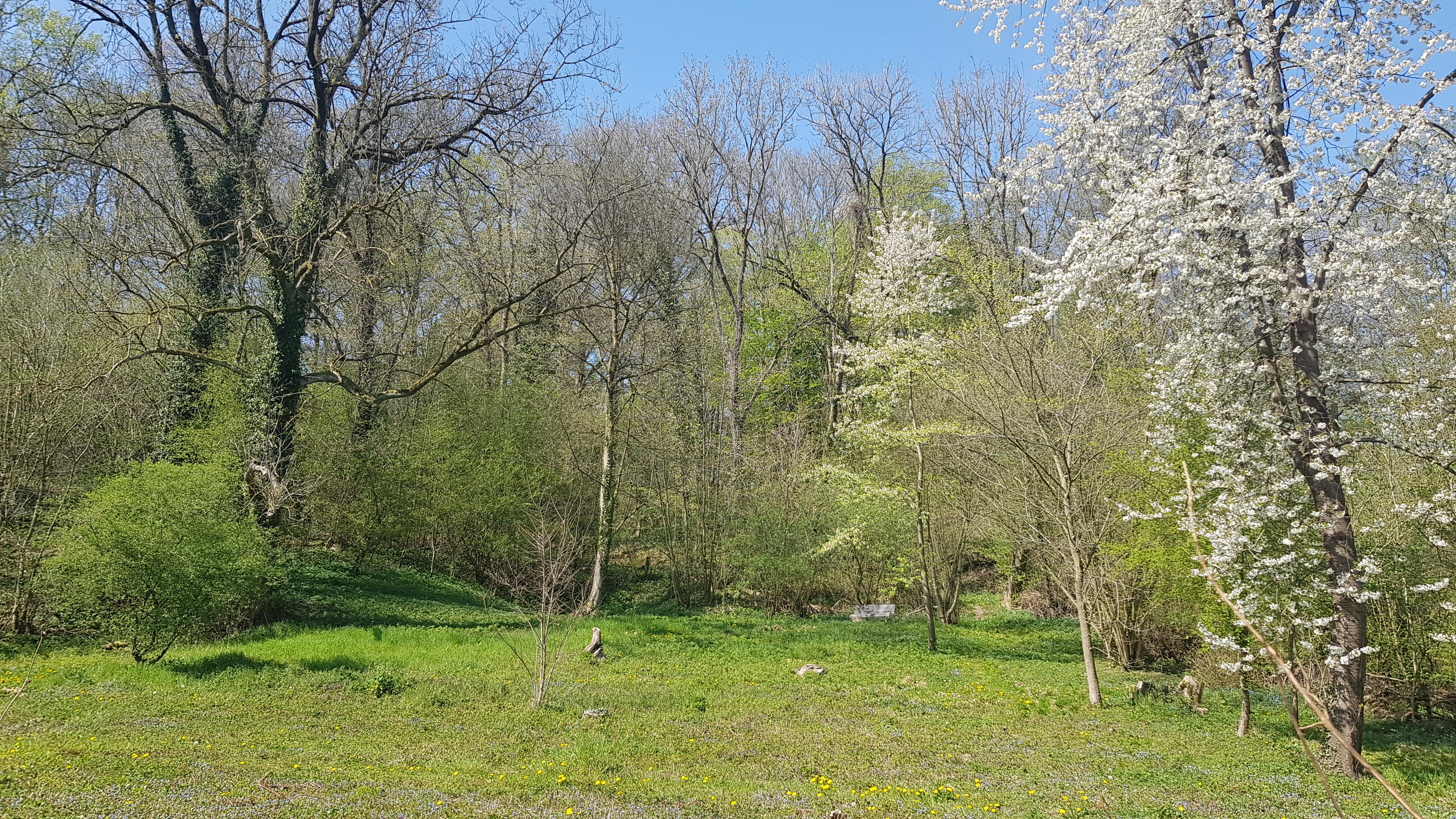 Groeve Lemmekenskoel, Sibbe, Nederland